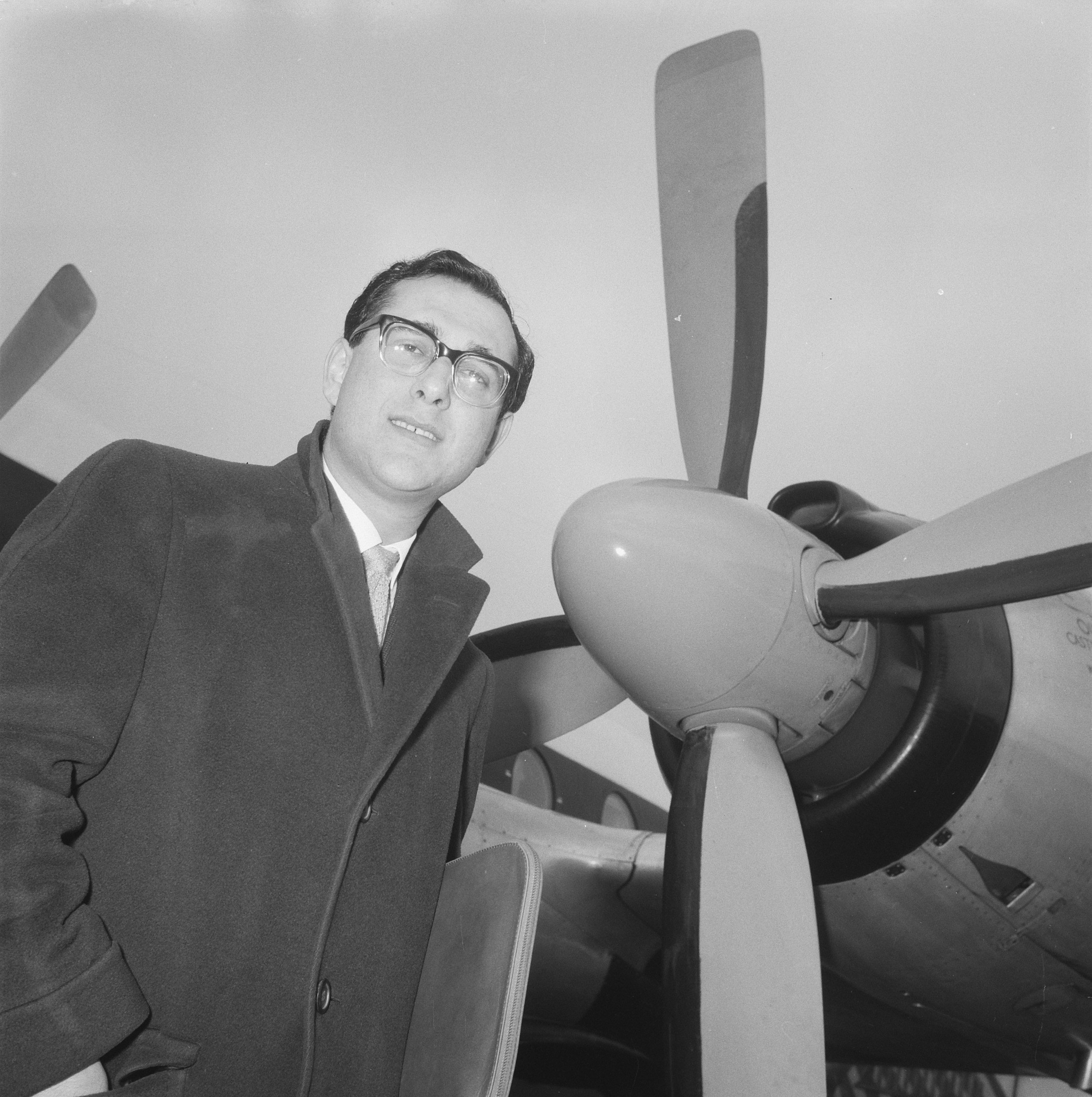 Collectie / Archief : Fotocollectie Anefo Reportage / Serie : [ onbekend ] Beschrijving : Engelse schrijver Harold Pinter in Holland om "Het Verjaardagsfeest" bij te wonen. Harold Pinter bij propeller Datum : 1 maart 1962 Trefwoorden : auteurs, propellers Persoonsnaam : Pinter, Harold Fotograaf : Nijs, Jac. de / Anefo Auteursrechthebbende : Nationaal Archief Materiaalsoort : Negatief (zwart/wit) Nummer archiefinventaris : bekijk toegang 2.24.01.03 Bestanddeelnummer : 913-5848